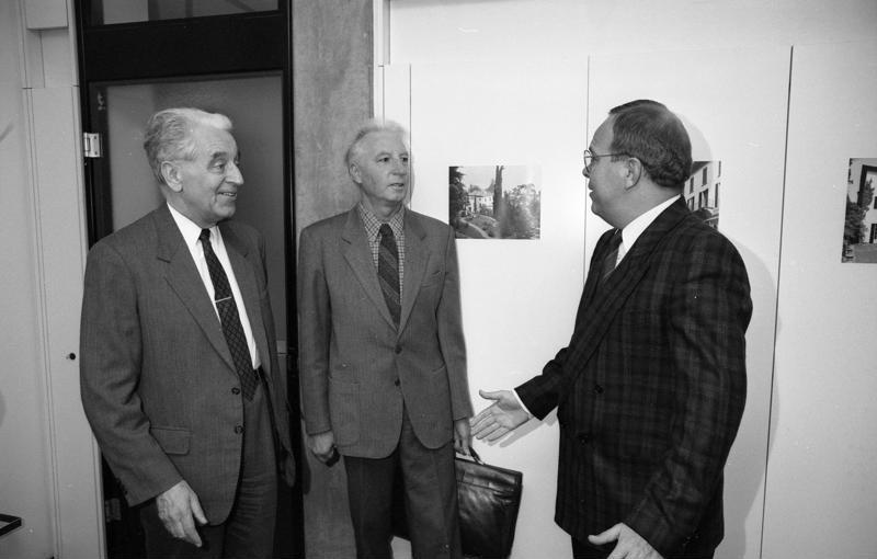 31.1.1989 Staatssekretär Dr. Fritz Schaumamm (rechts) empfängt den Präsidenten und den Generalsekretär des Europäischen Hochschulinstituts in Florenz/Italien, Émile Noel (links) und Dott. Marcello Buzzonetti (Mitte), im Bundesministerium für Bildung und Wissenschaft